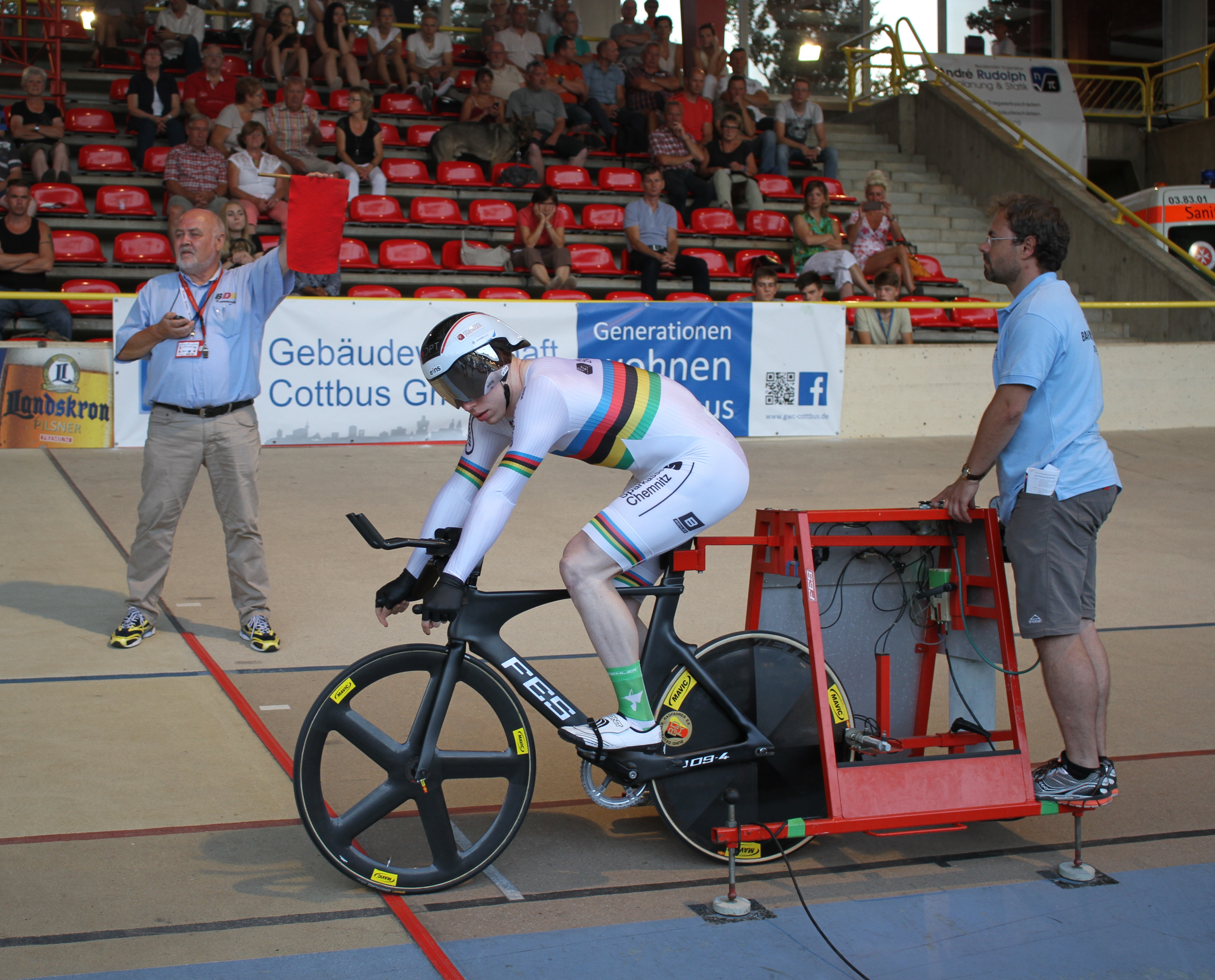 Joachim Eilers, deutscher Radsportler